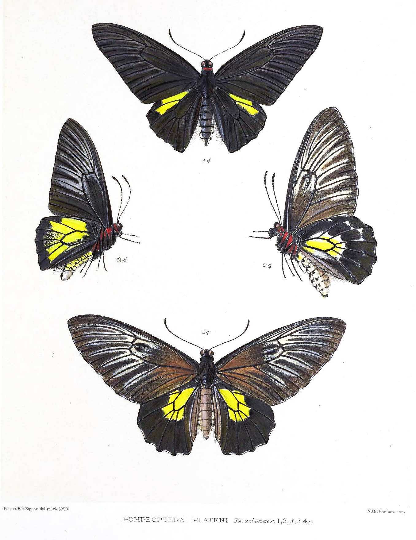 Pompeoptera plateni